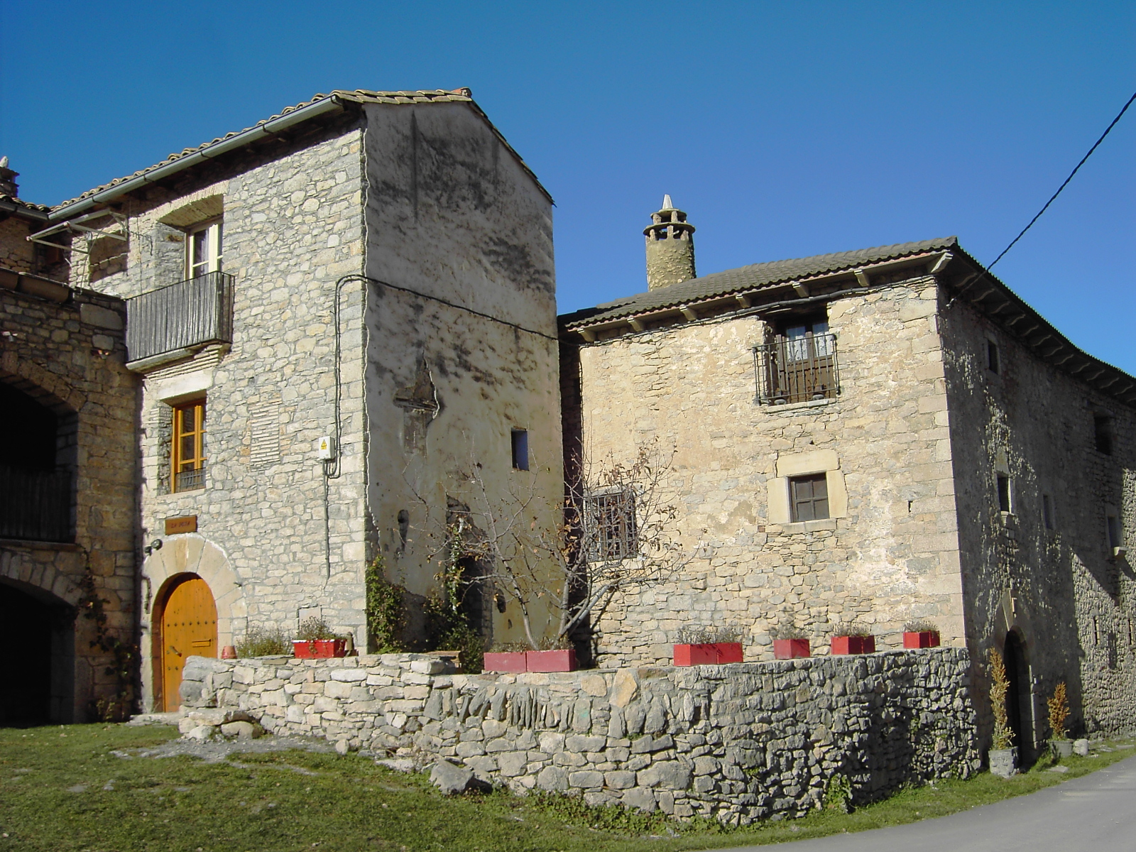 Stony façanes in Sarsa de Surta, Huesca, Spain.